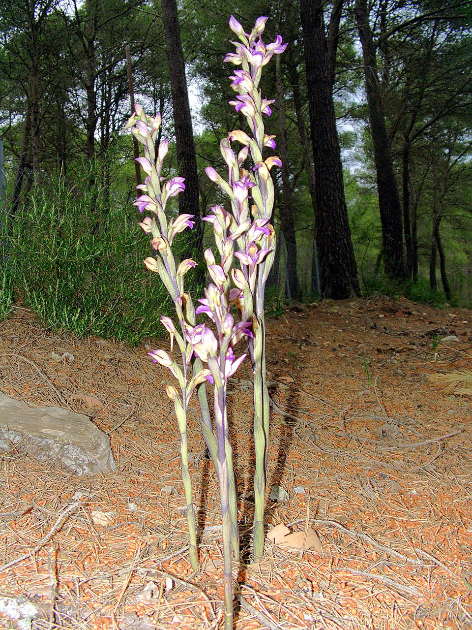 Limodorum abortivum - plants